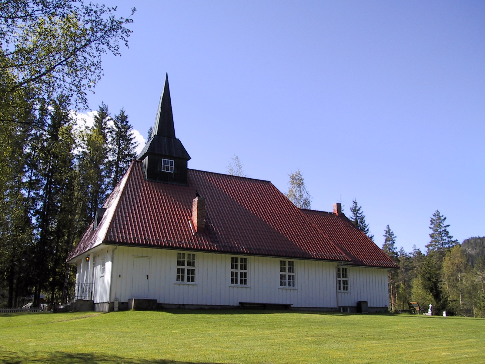 Hof Finnskog kirke i Åsnes